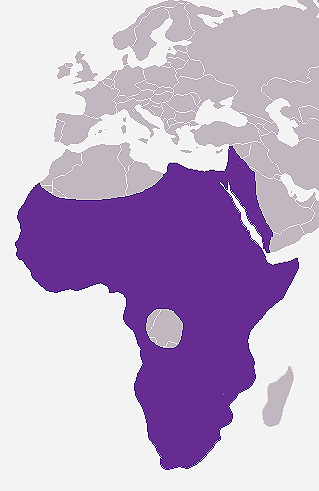 Występowanie Procavia capensis